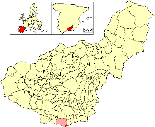 Situación de la localidad de Calahonda (en la entidad local autónoma de Carchuna-Calahonda, municipio de Motril) respecto a la provincia de Granada, en España.